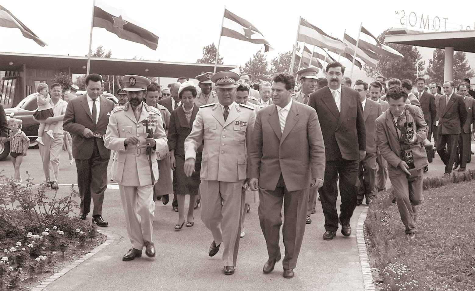 Josip Broz Tito in cesar Haile Selassie v Kopru.